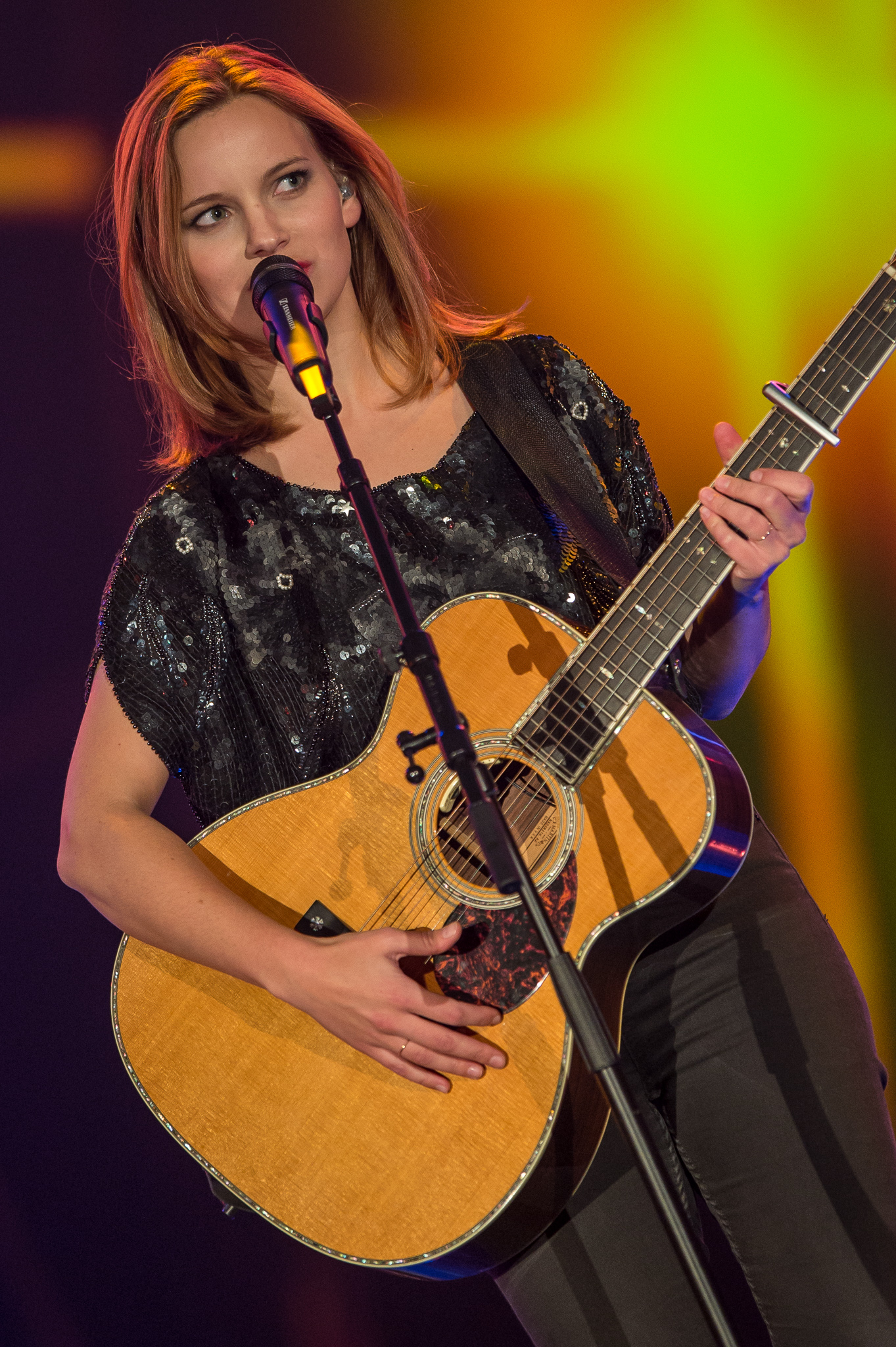 BR,Bayerisches Fernsehen,Frankenhalle,Live-Sendung,Marit Larsen,Sternstunden-Gala,Sternstundengala